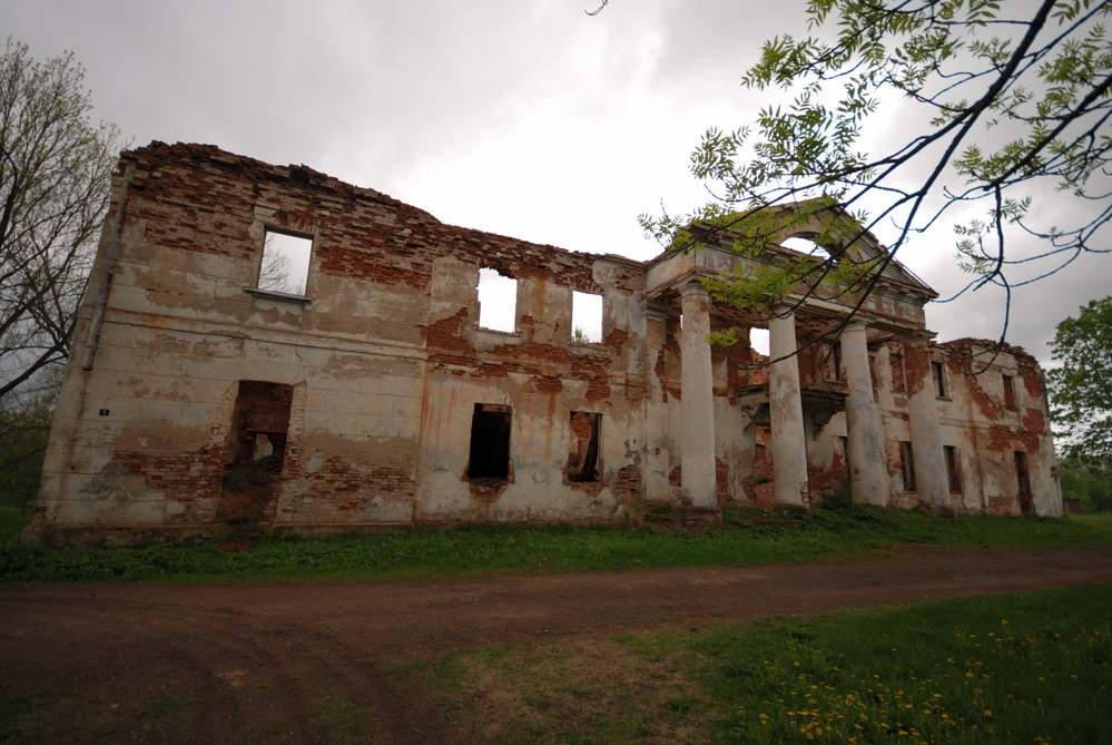 Беларуская (тарашкевіца): Былы сядзібна-паркавы комплекс Ю. Ю. Амбургера: рэшткі сядзібнага дому, былы дом упраўляючага, фрагмэнты парку. мяст. Обаль This is a photo of Belarusian heritage monument. Reference number: 213Г000863 ( WLM)